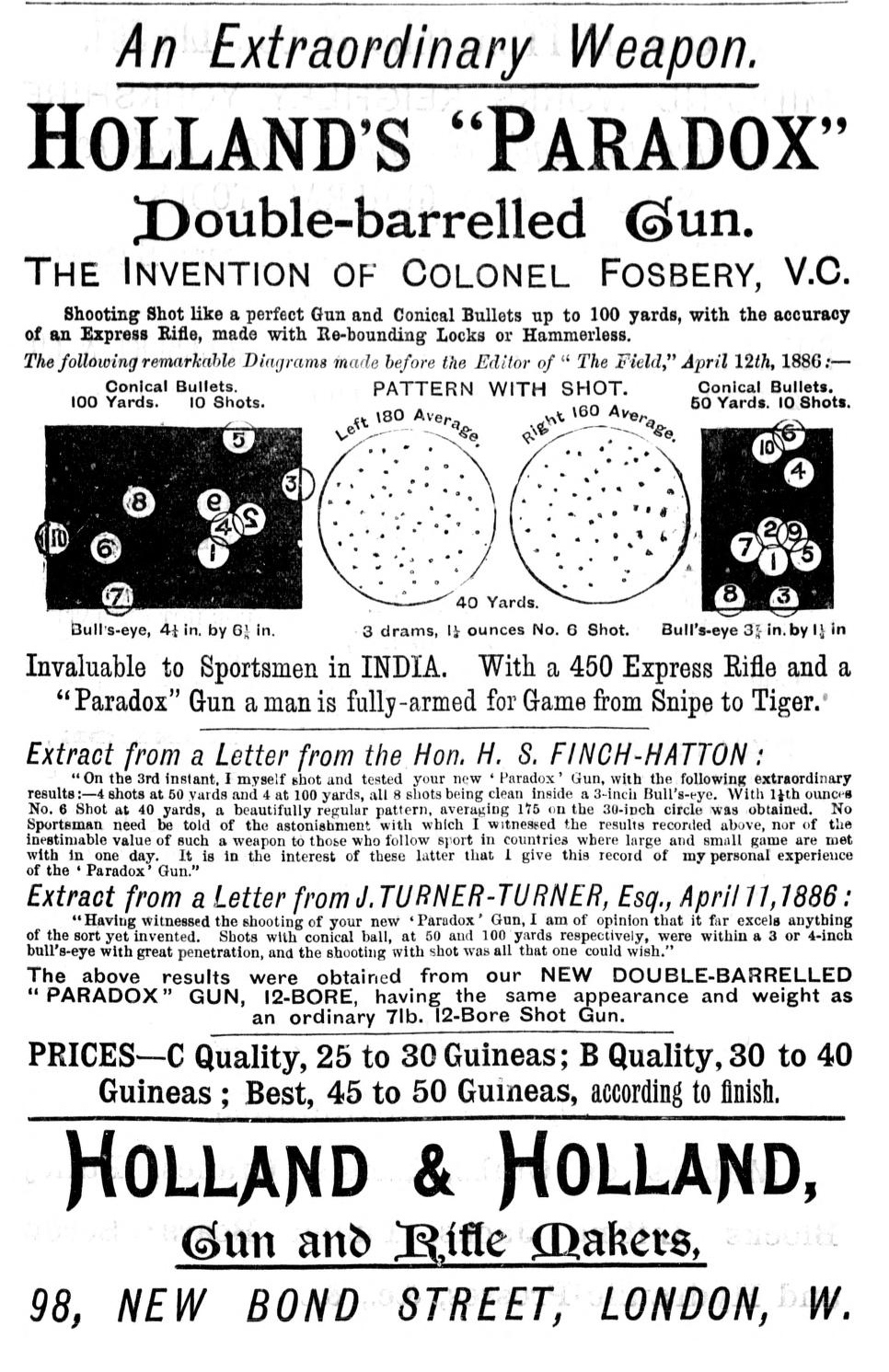 Advertisement for Paradox gun